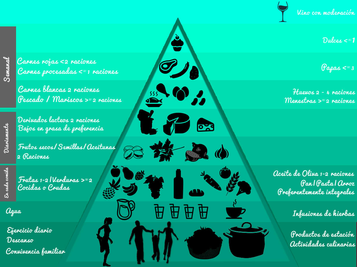 Piramide de como seguir la dieta mediterranea